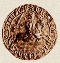 Robert VII d'Auvergne, sceau du XIIIème siècle.